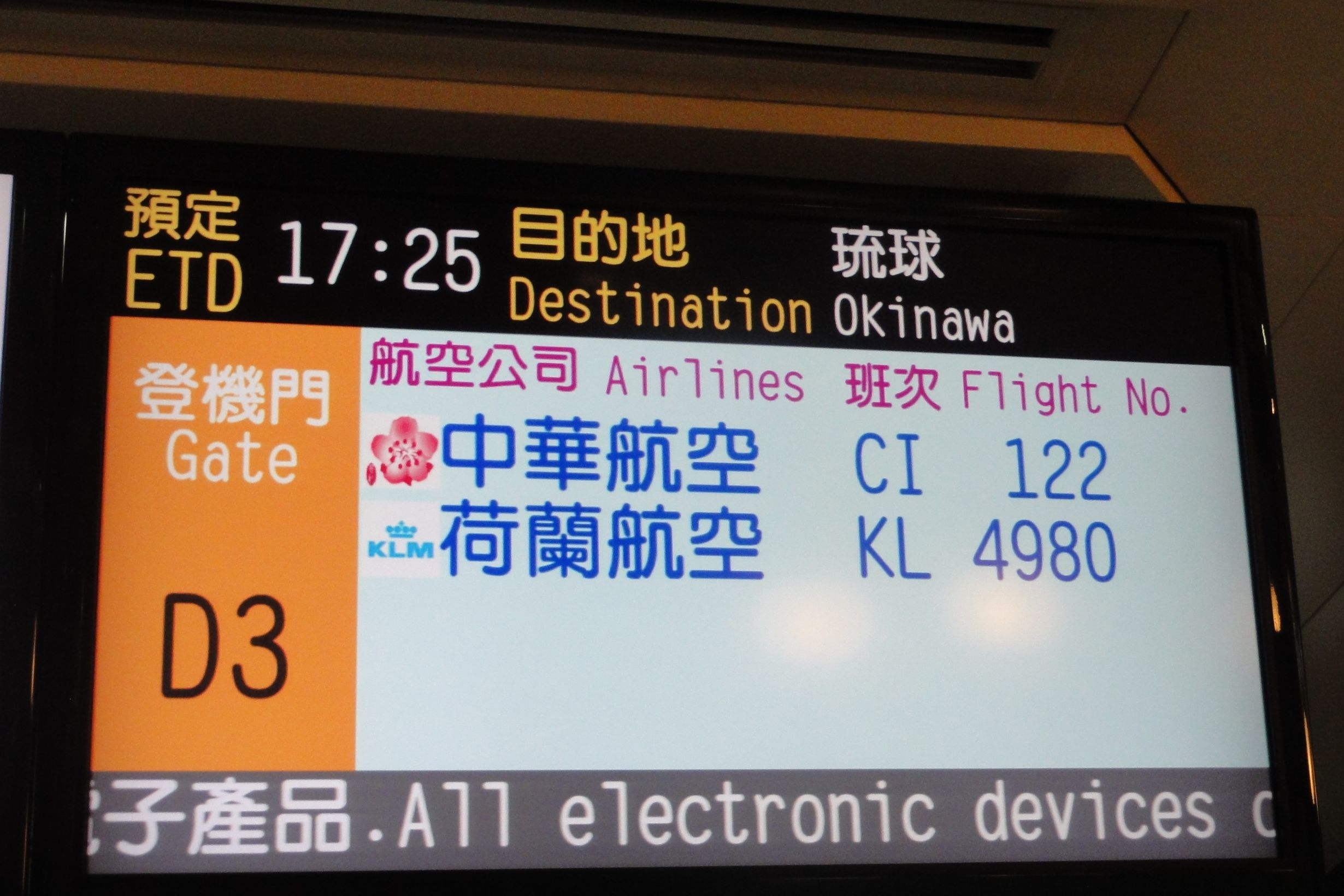 桃園国際空港 CI122便案内表示